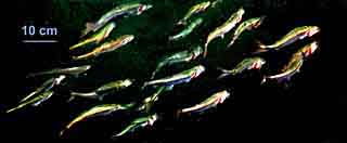 Atlantische Heringe im Schwarm Größeres Bild auf